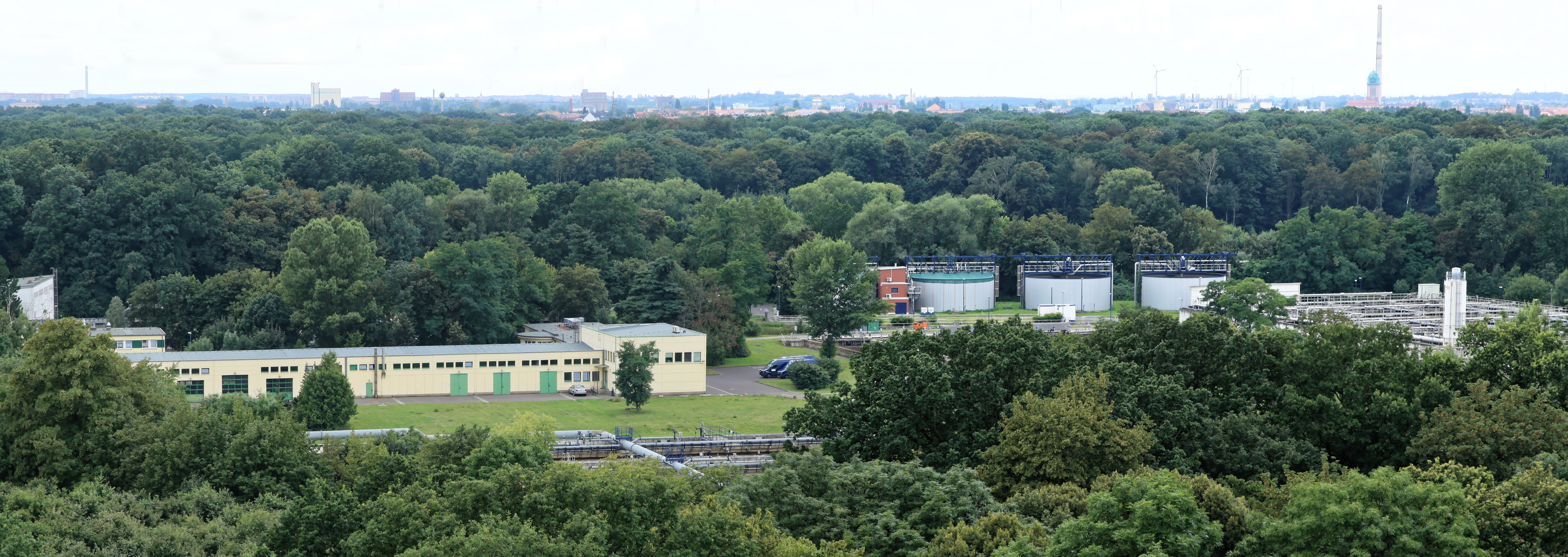 Blick vom Rosentalturm zum Klärwerk Rosental, Rosental in Leipzig